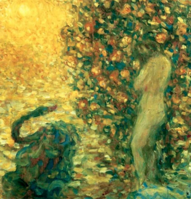 Первая половина 1900-х гг., Собрание Т.В.Рубинштейн